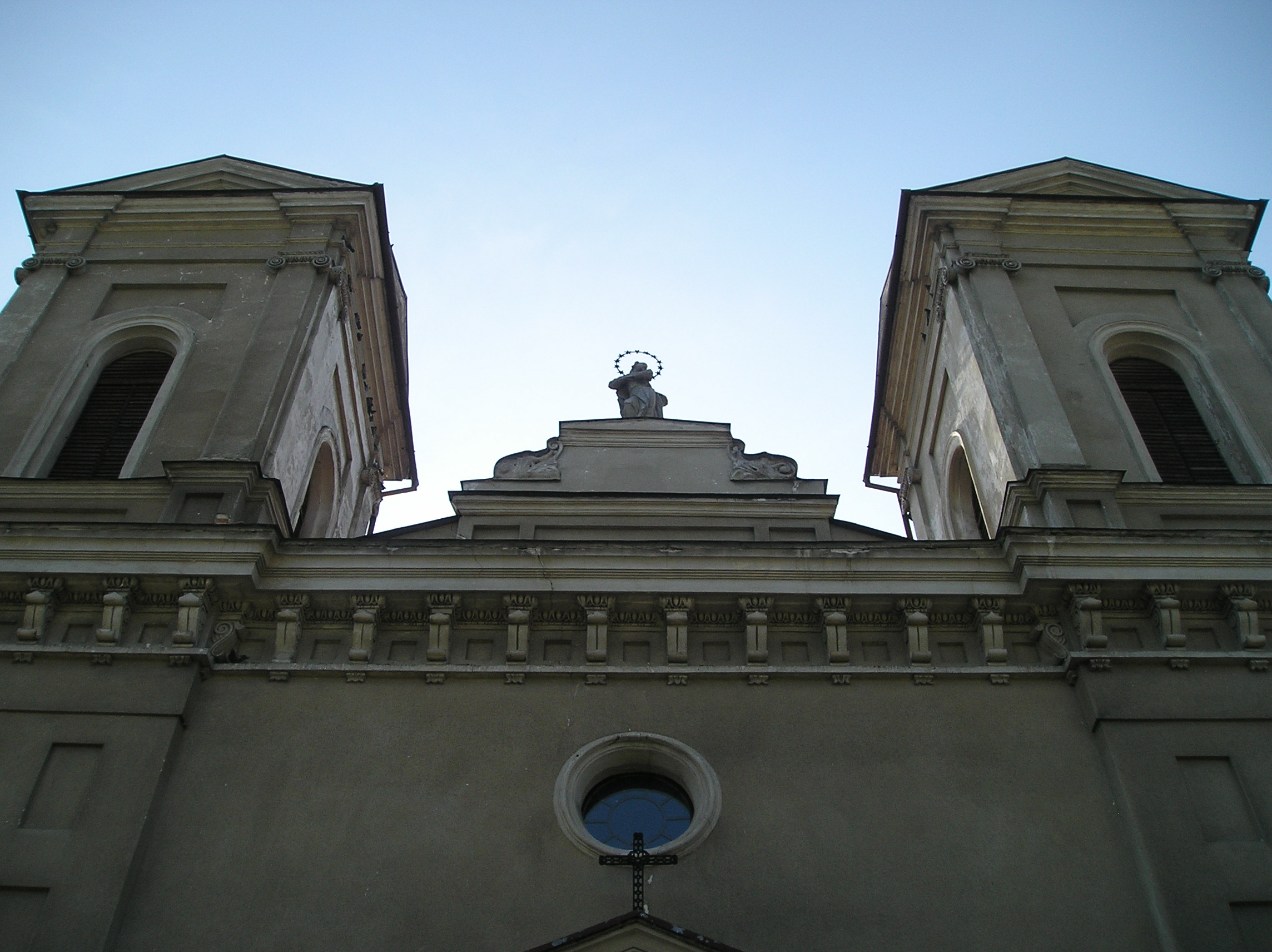 Kościół katolicki p.w. św. Stanisława Biskupa i Męczennika